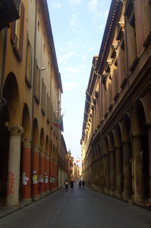 Via Luigi Zamboni, strada storica di Bologna This is a photo of a monument which is part of cultural heritage of Italy.